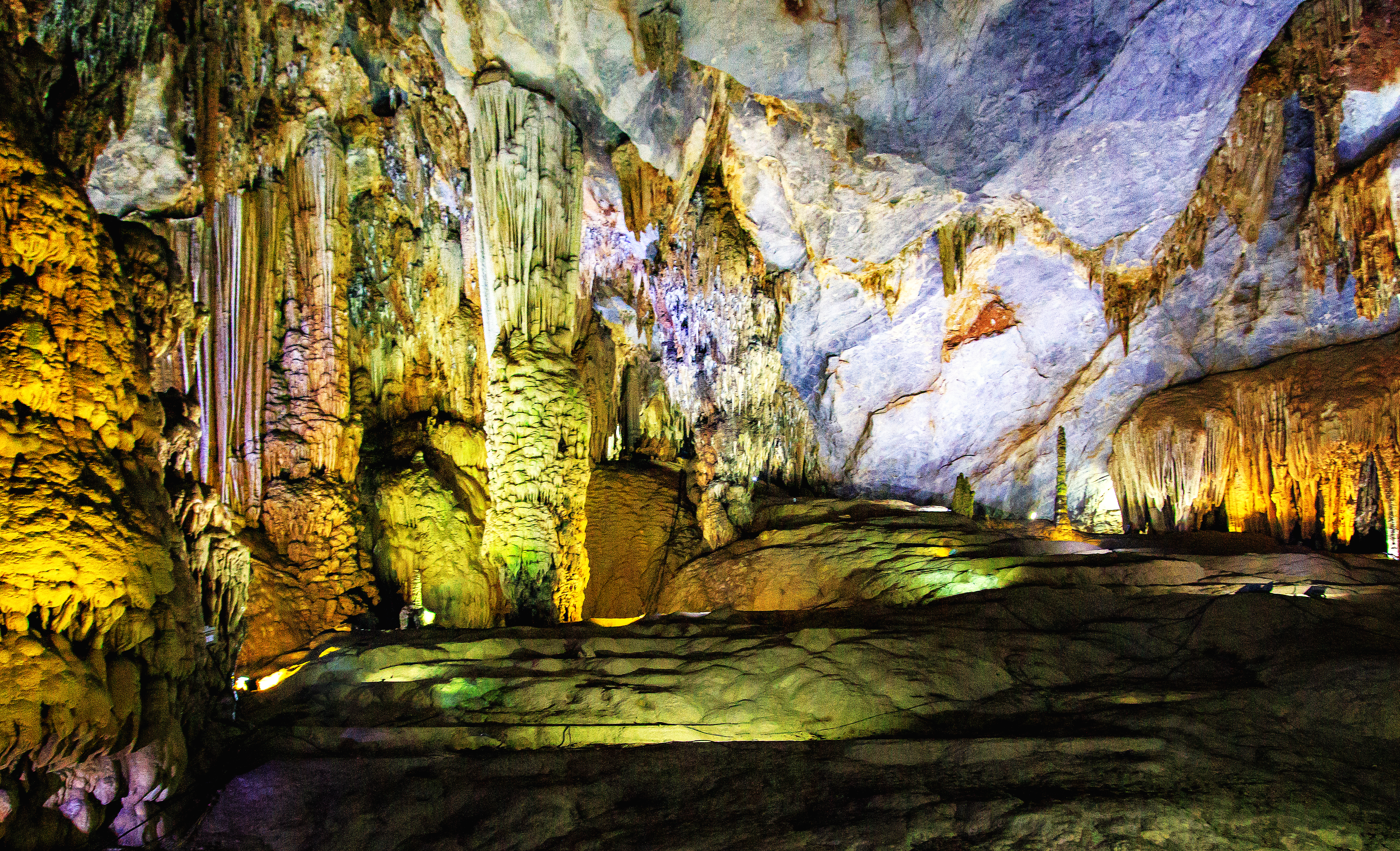 Trong động Thiên Đường ở Quảng Bình, Việt Nam.